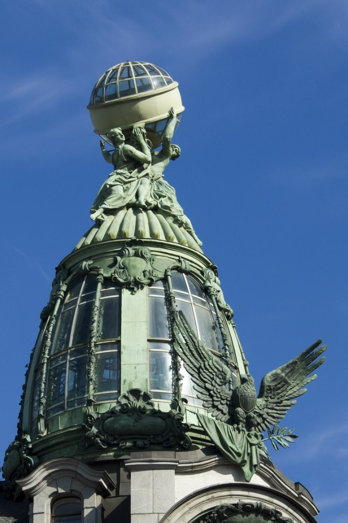 Дом компании «Зингер» (Санкт-Петербург, Невский проспект, 28, канала Грибоедова наб., 21)